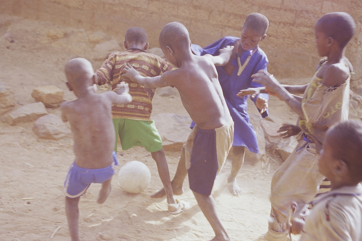 Garçons jouant au foot dans le village de Kani-Kombolé au pays dogon, région de Mopti, Mali